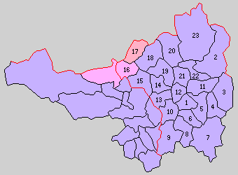 岩手県東磐井郡の町村。